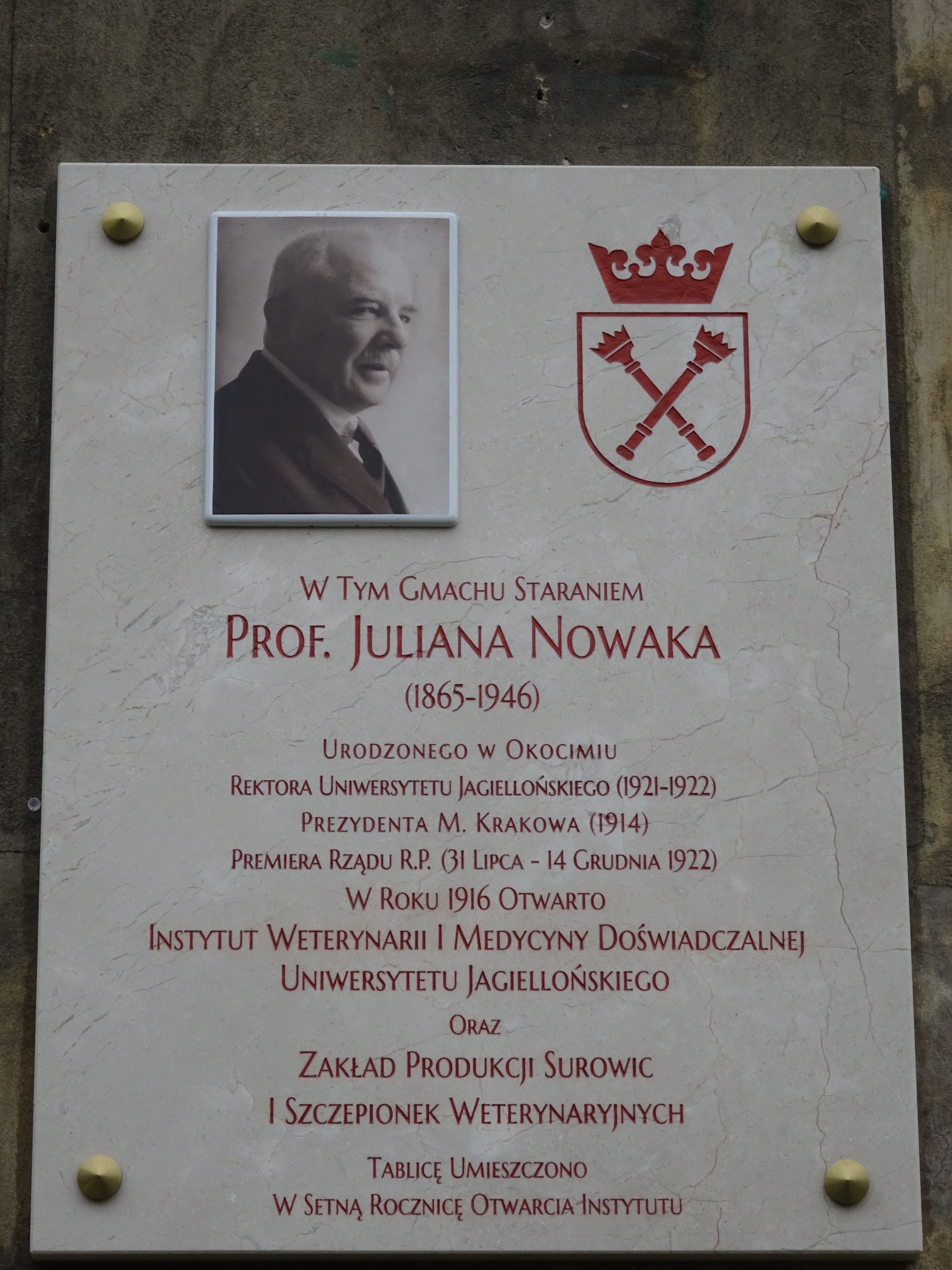 Katedra Mikrobiologii Uniwersytetu Jagiellońskiego, Ulica Czysta 18 - tablica upamiętniająca profesora Juliana Nowaka. Kraków, 2017.